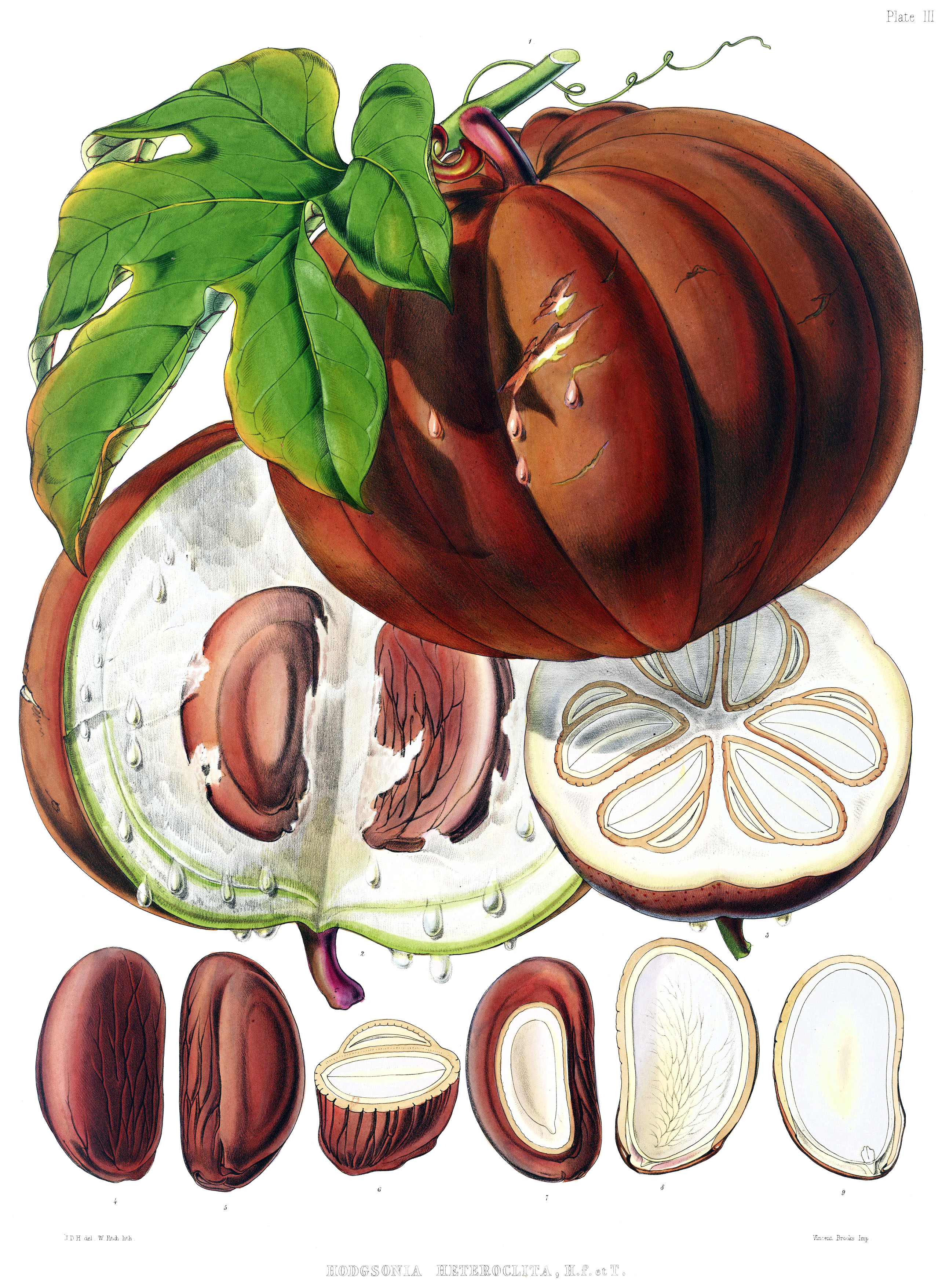 Fruit of Hodgsonia heteroclita